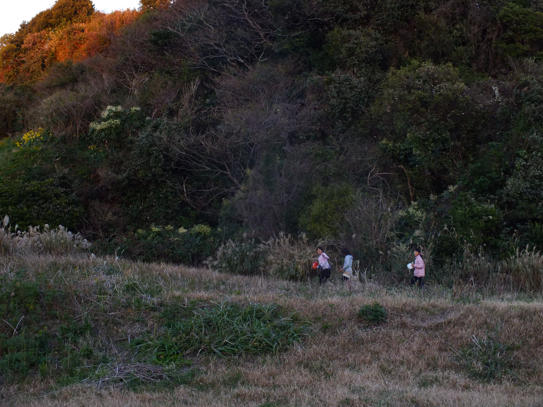 2013-11-30 Hachiman-Misaki Ohhara Isumi いすみ市大原八幡岬